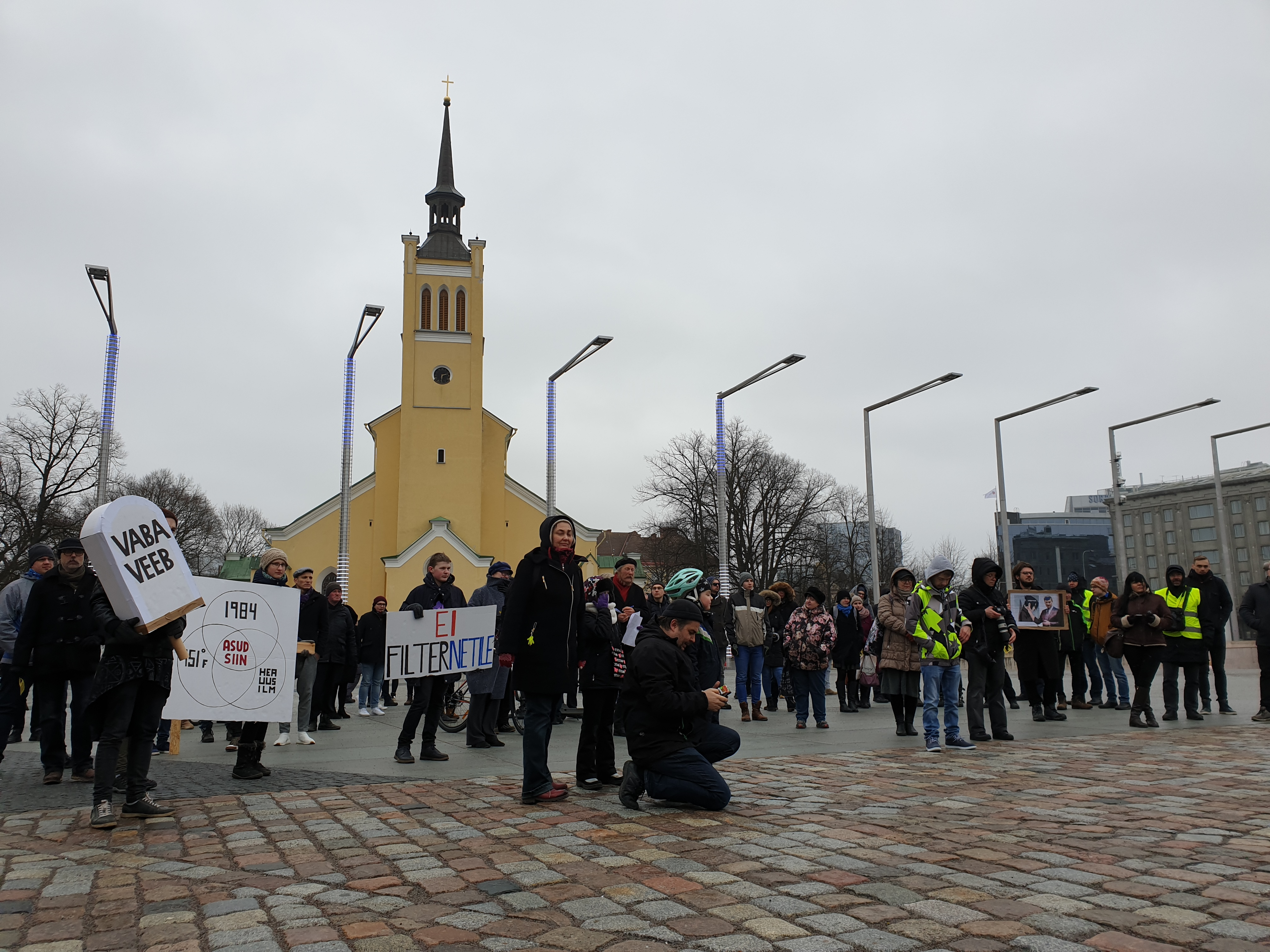 Meeleavaldajad 10 minutit pärast avasõnu algavat vihma trotsimas